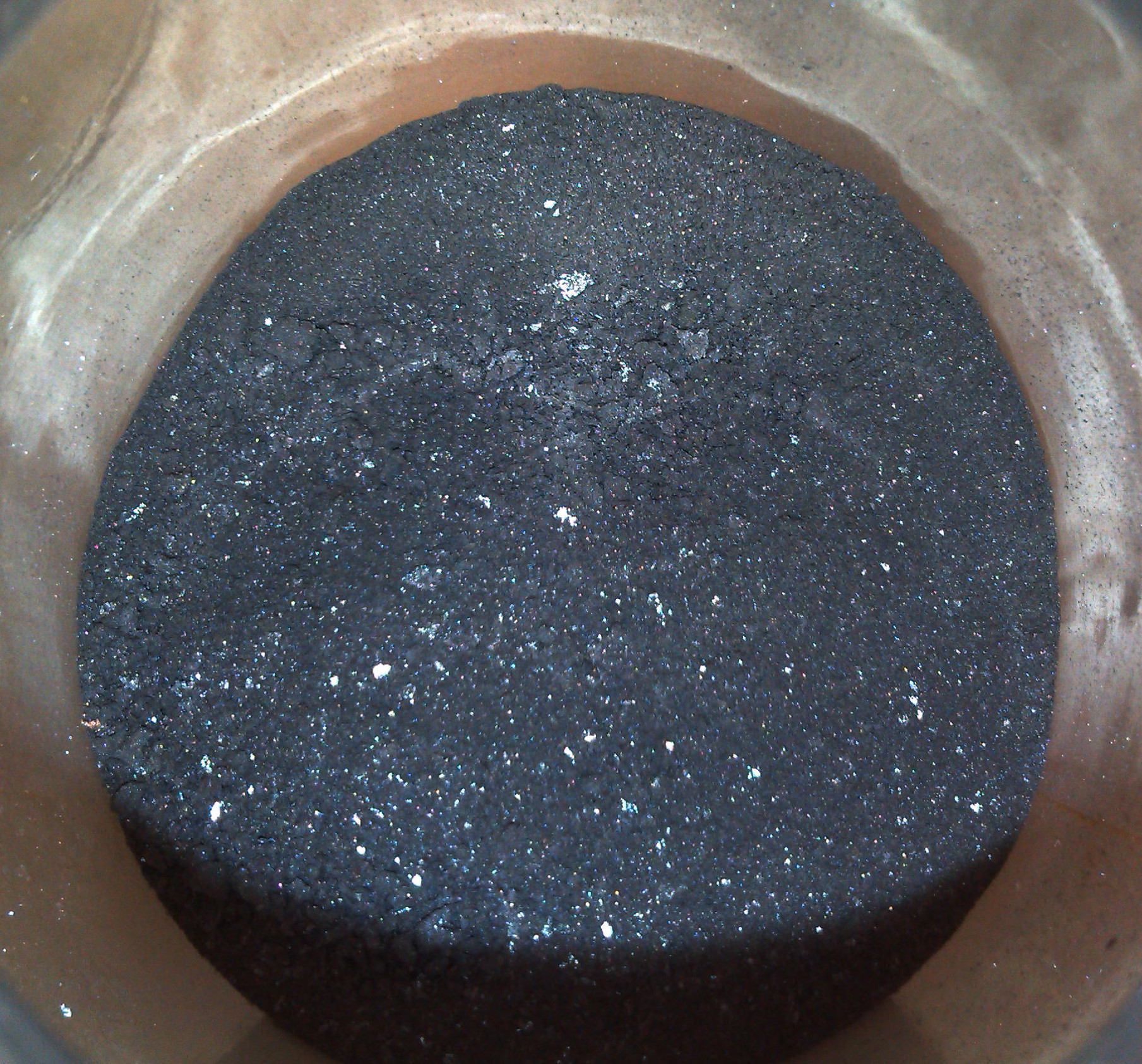 Silicio en polvo. Foto tomada el día 2 de marzo de 2015 en los laboratorios docentes de la Universidad de Jaén.